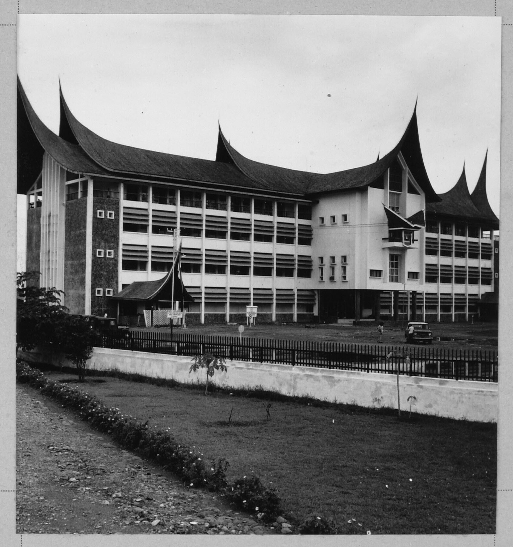 COLLECTIE TROPENMUSEUM TMnr 20004013